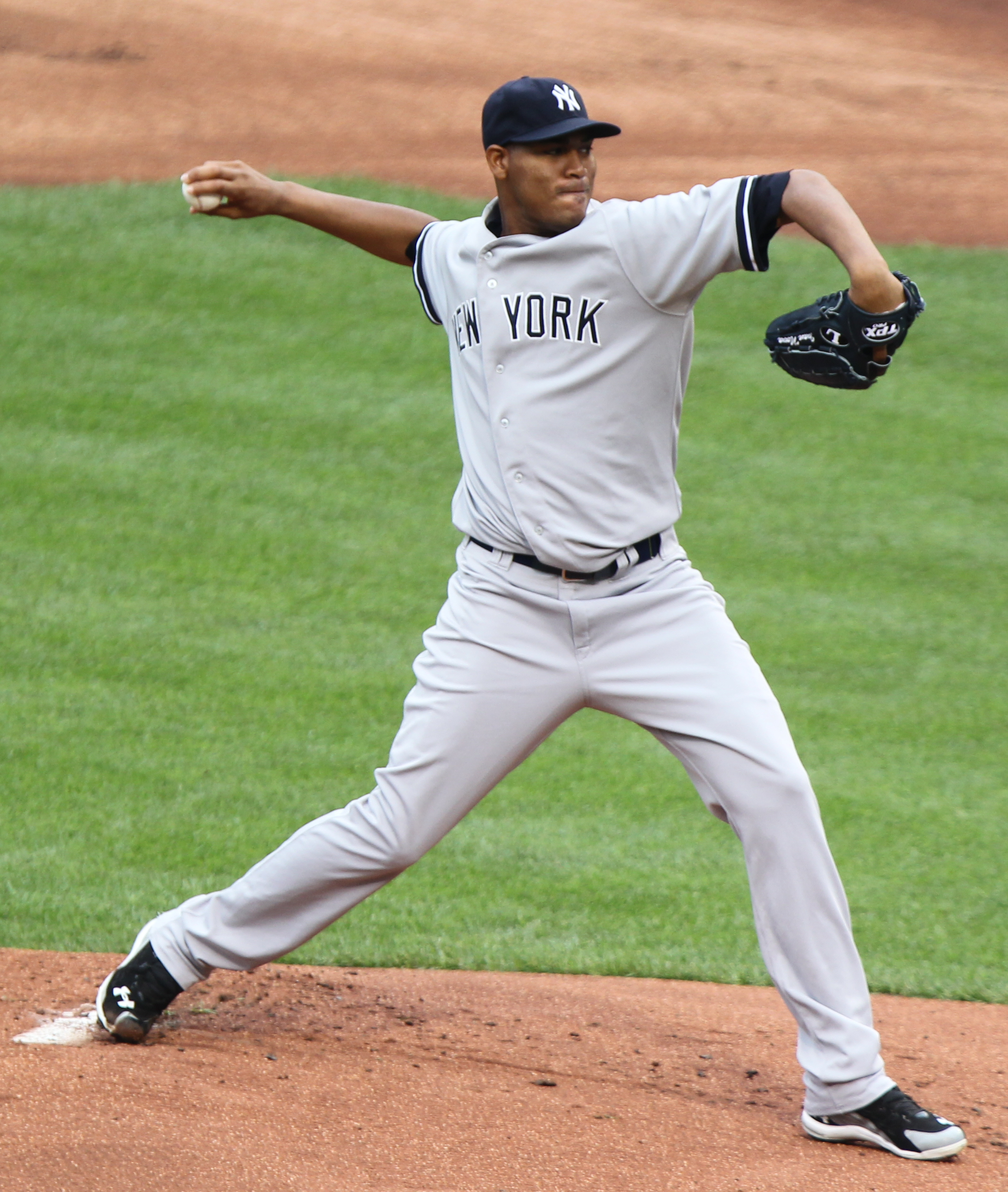 Yankees at Orioles September 8, 2011